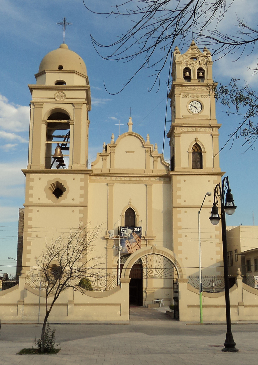 Iglesia de San Juan Bautista.